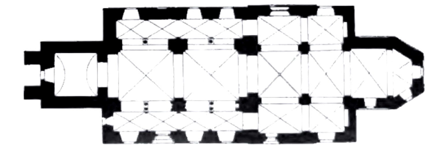 Grundriss der Kirche in Ense Bremen